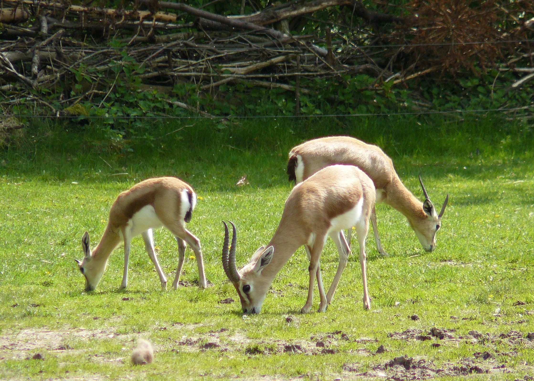 Gazella dorcas at Munich